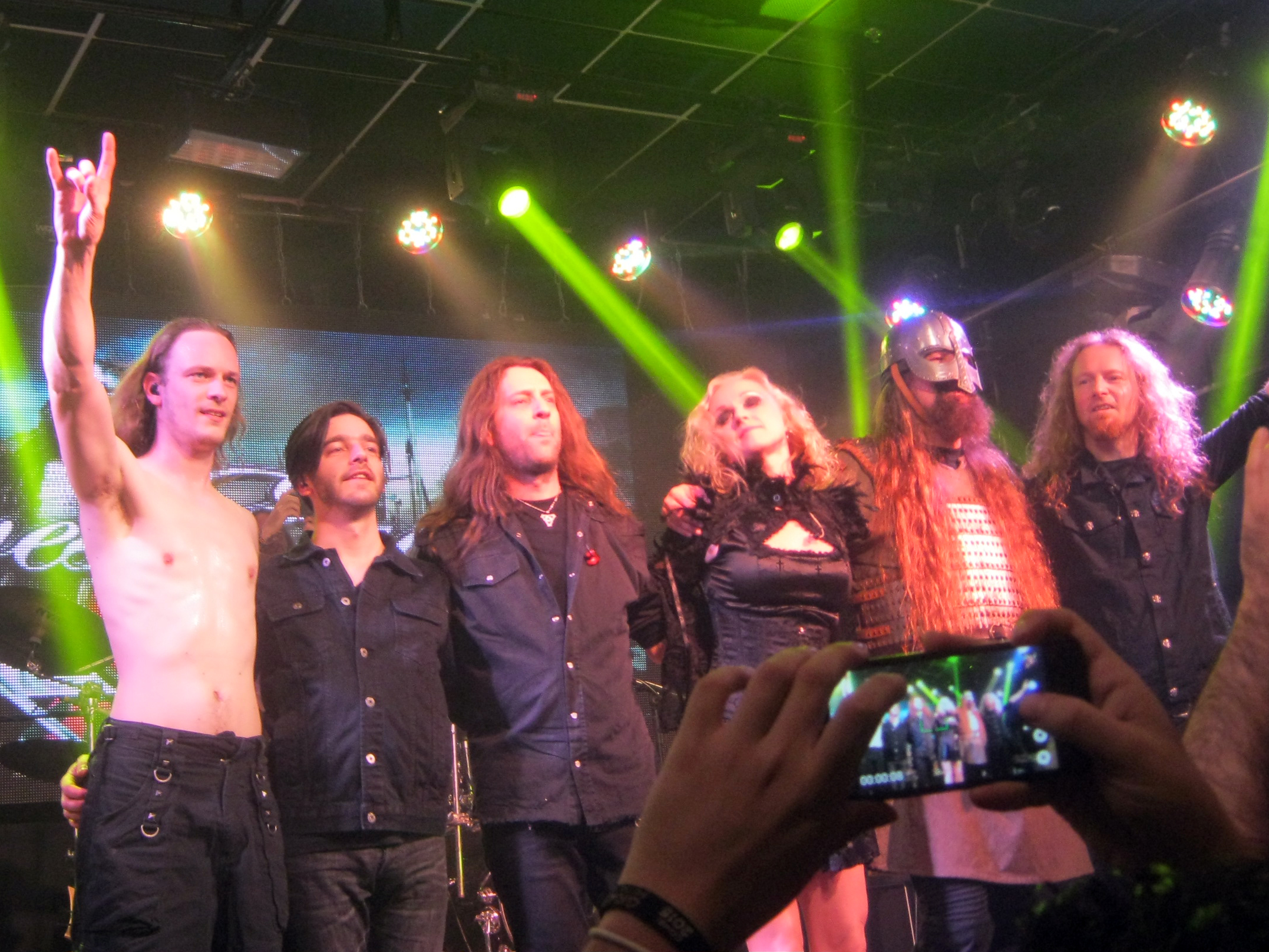 Leaves' Eyes In Israel, 2016